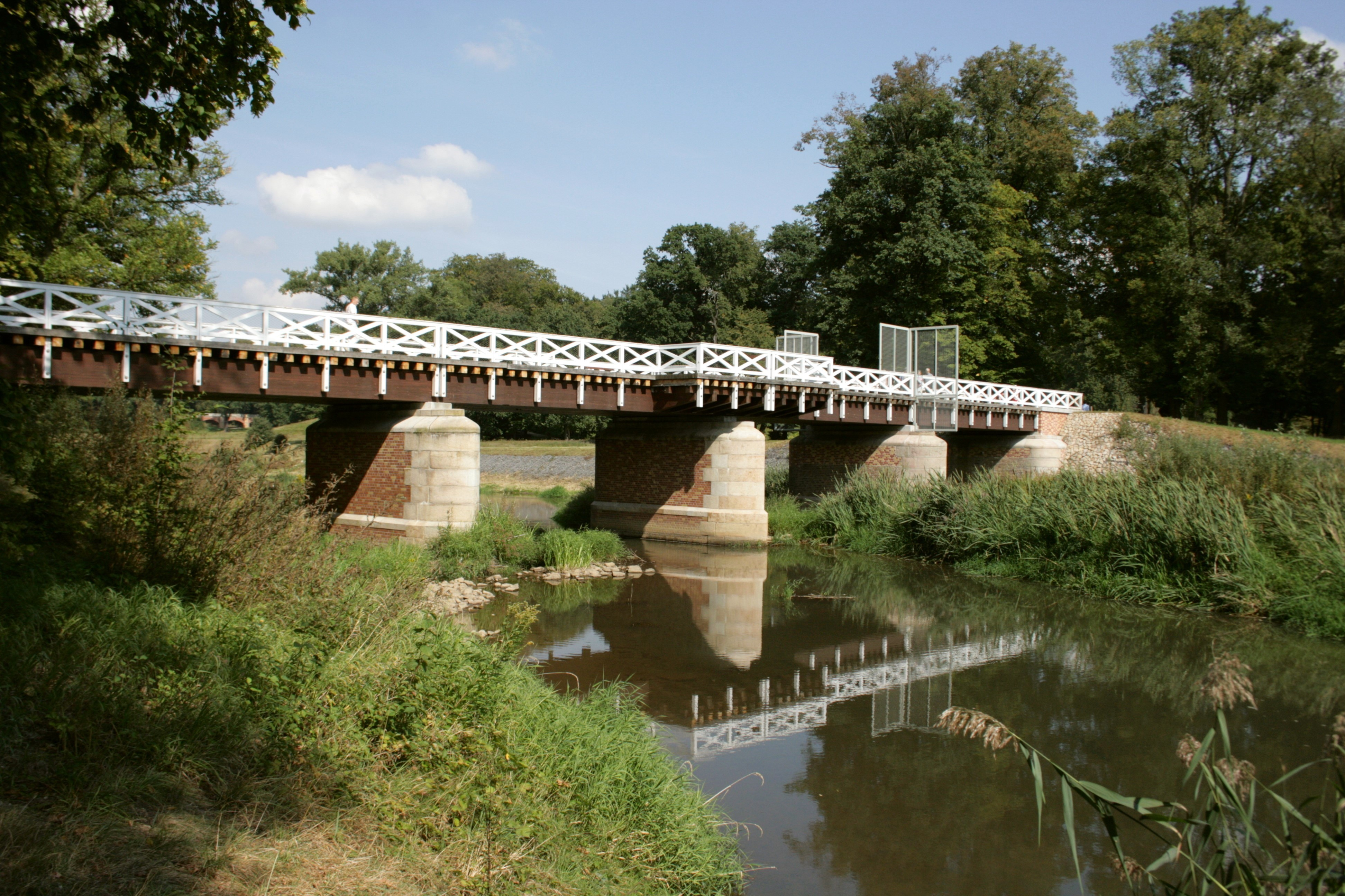 Doppelbrücke über die Neisse, Muskauer Park in Bad Muskau